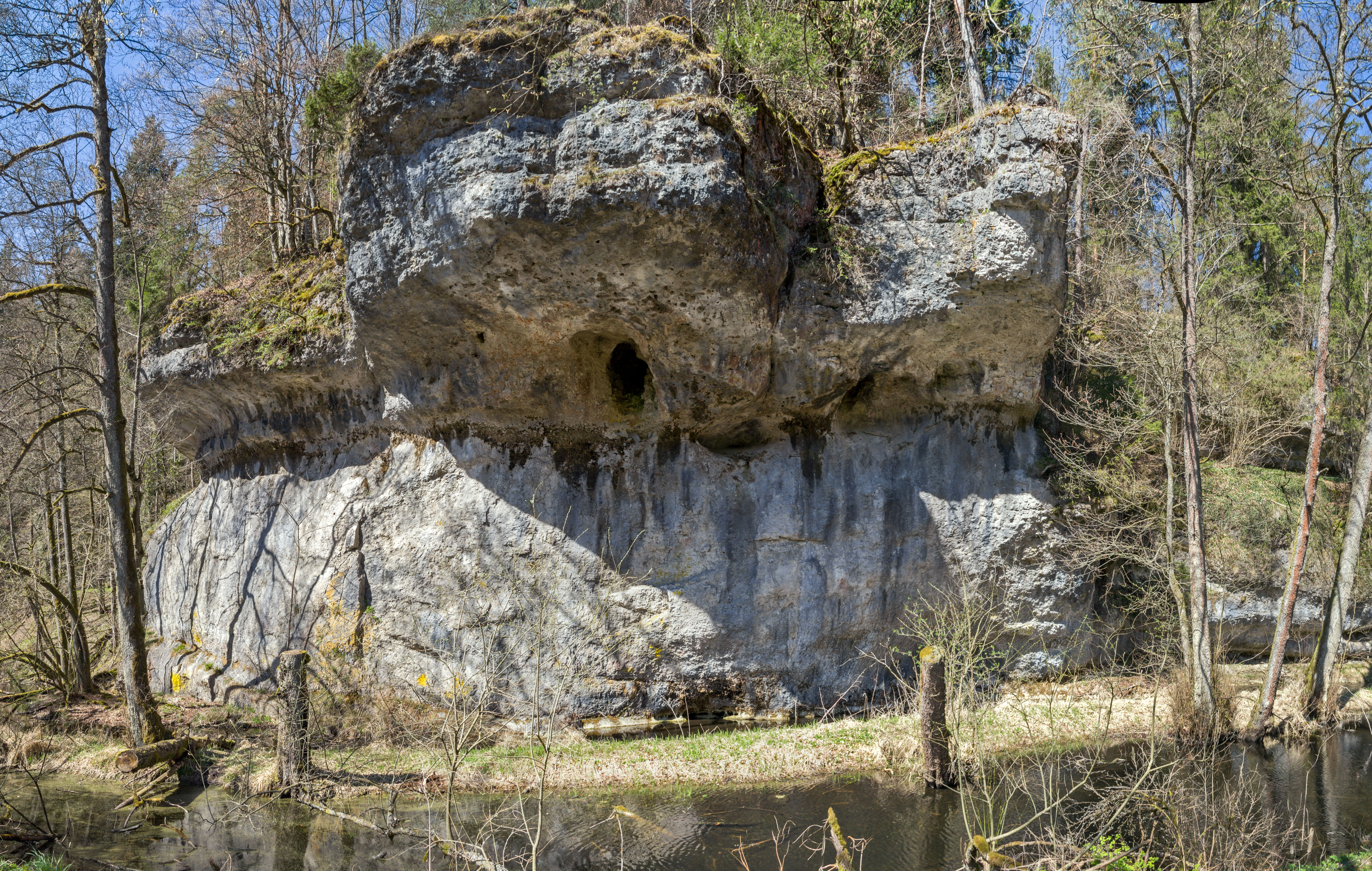 Felsen Eulenloch mit Höhle, Geotop im NSG Pegnitzau